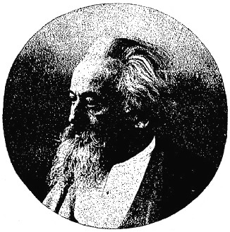 "Victor Huel 1844-1923".